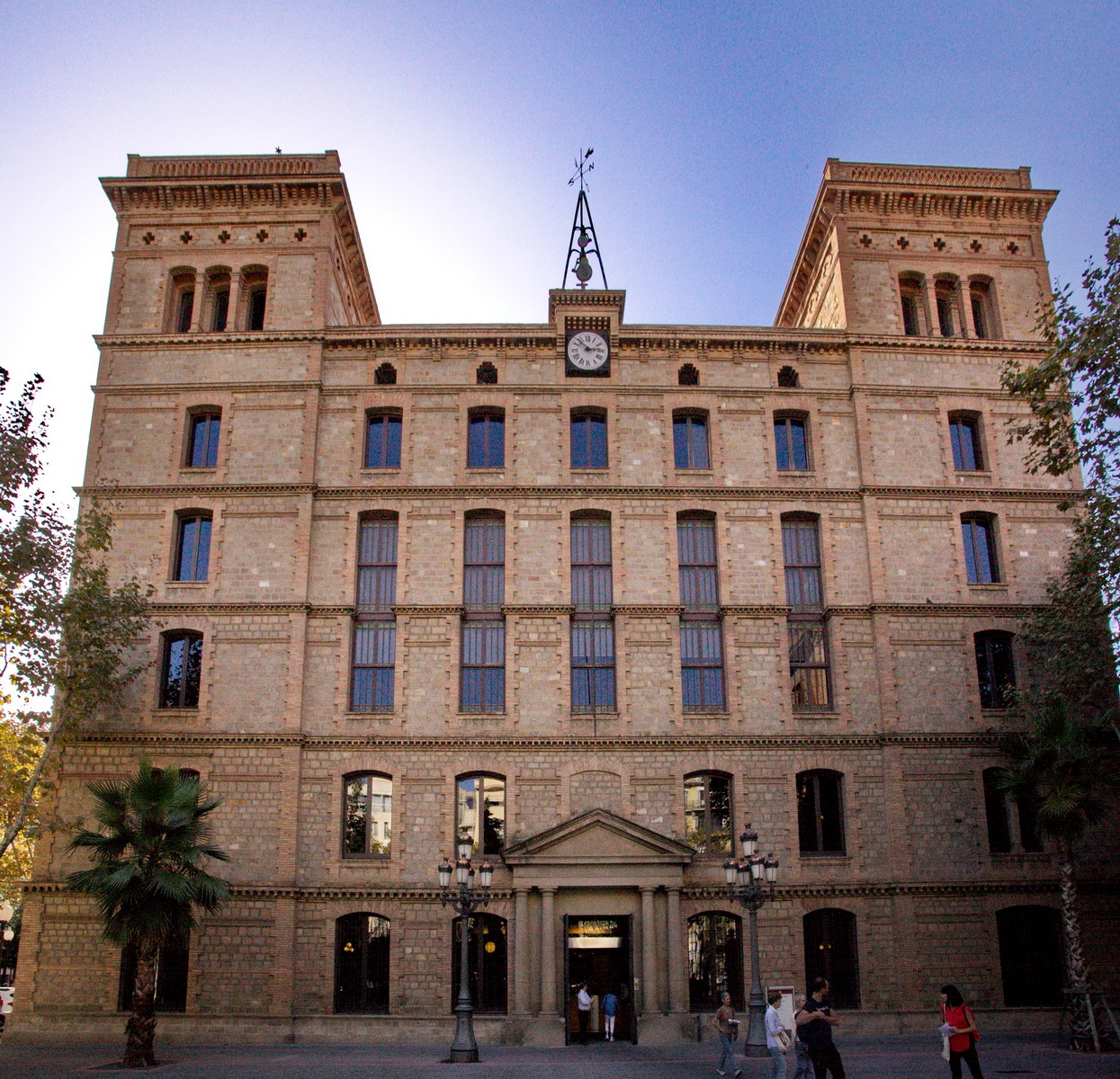 Edificis del complex de l'Antiga fàbrica Can Batlló al carrer Urgell de Barcelona. Edifici del Rellotge